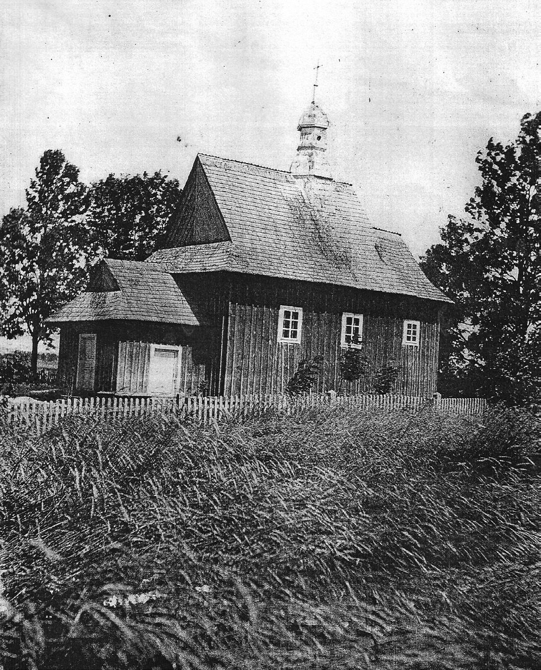 Cerkiew pw. Św. Michała Archanioła w Rudzie, pow. chełmski, zniszczona w r. 1915Latina: Templum Sancti Archangeli Michaeli ritus graeci, Ruda, Polonia, districtus chelmensis, anno 1915 destructa